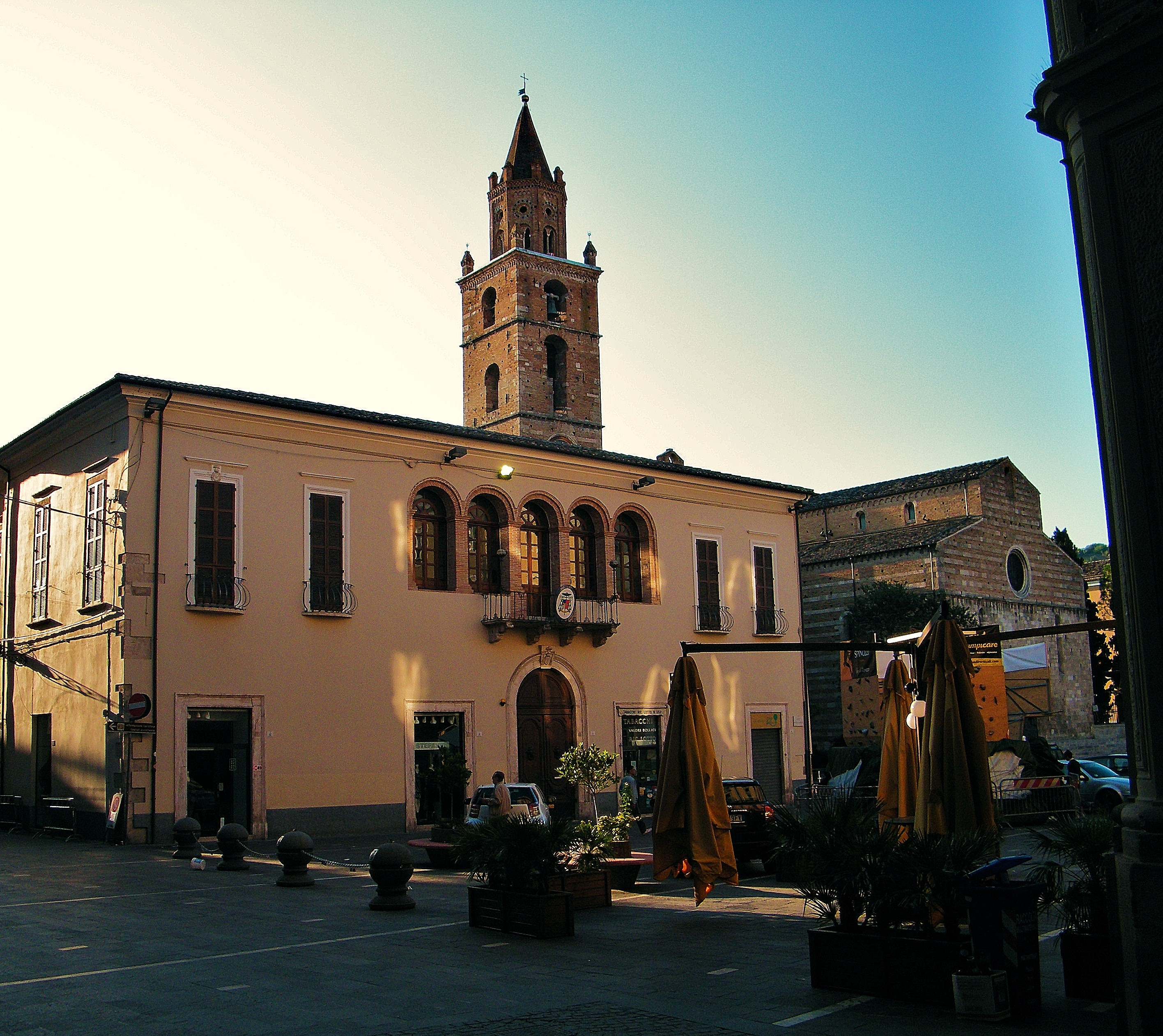 Palazzo Vescovile & Duomo di San Berardo - Teramo.